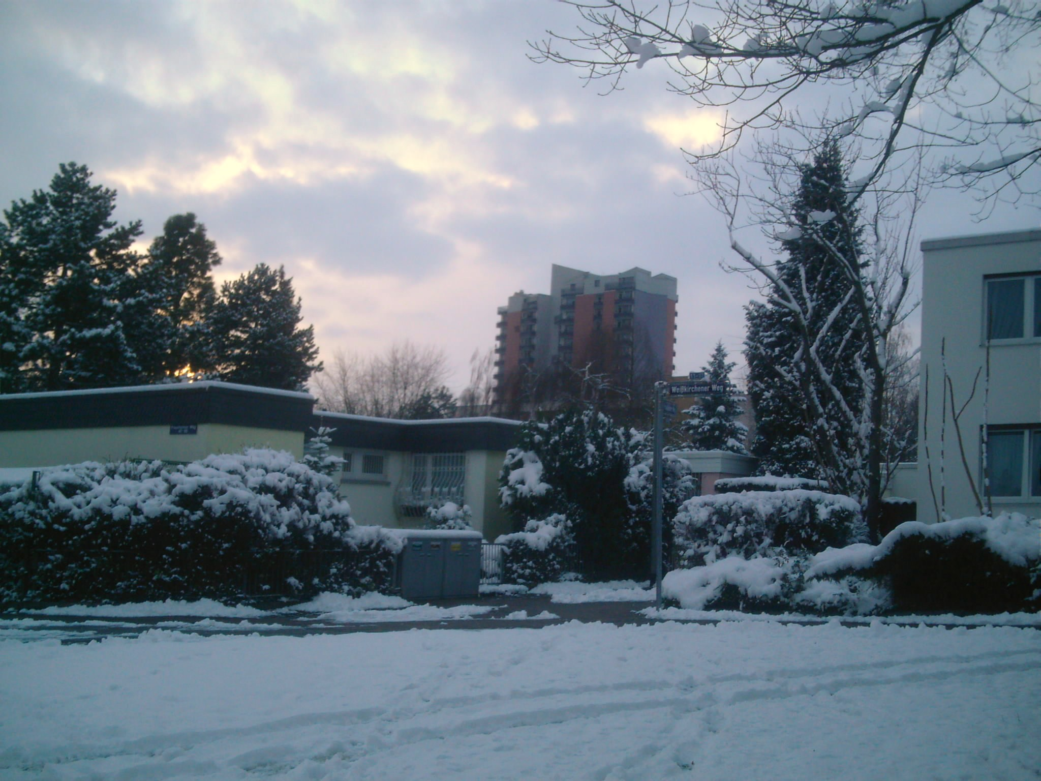 selbst aufgenommen